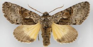 Charadra franclemonti female